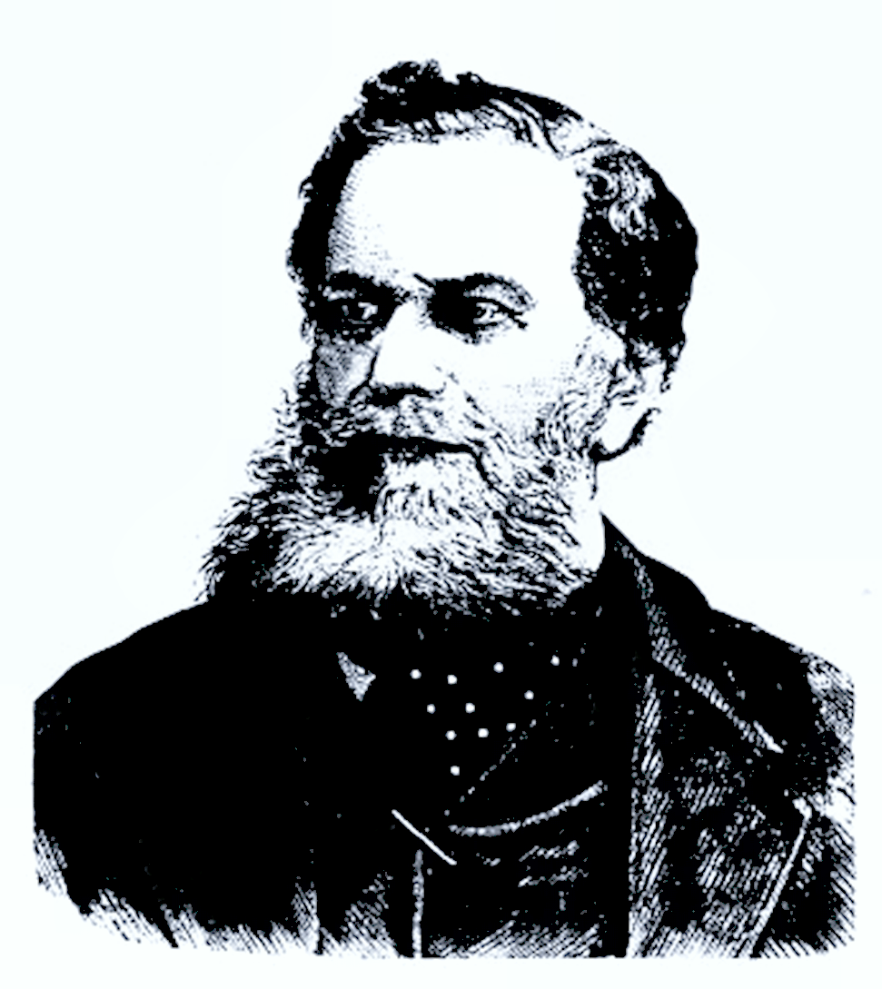 Simon Georg Freiherr von Sina 1873